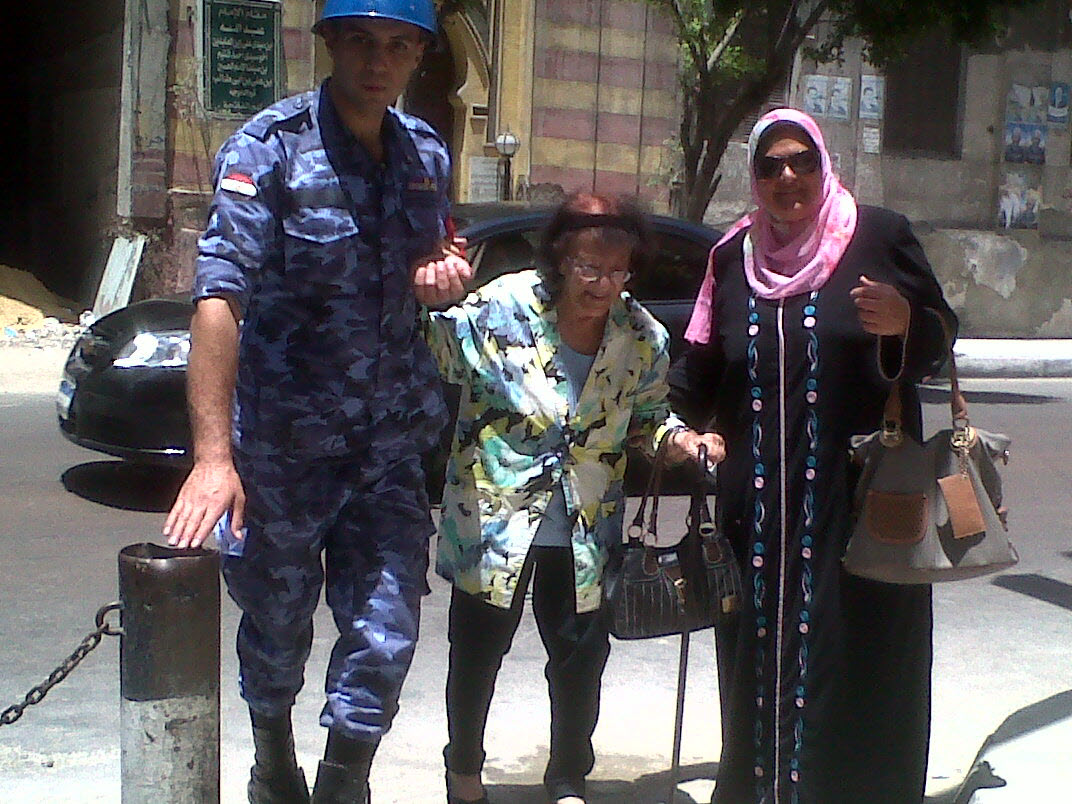 Egyptian presidential election, 2014